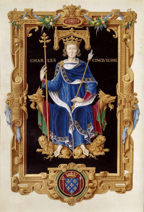 Charles V le sage d'après le Recueil des rois de France de Jean Du Tillet. Bibliothèque Nationale de France. Peinture réalisée d'après l'image gravée sur le grand sceau du roi. Un médaillon, au milieu de la partie inférieure de la bordure, présente l'image du contre-sceau royal.